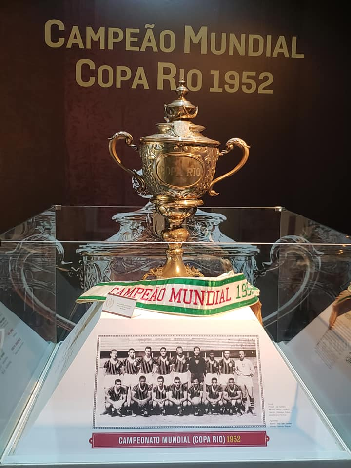 Ambiente da Copa Rio de 1952 em exposição na Sala de Troféus do Fluminense Football Club.